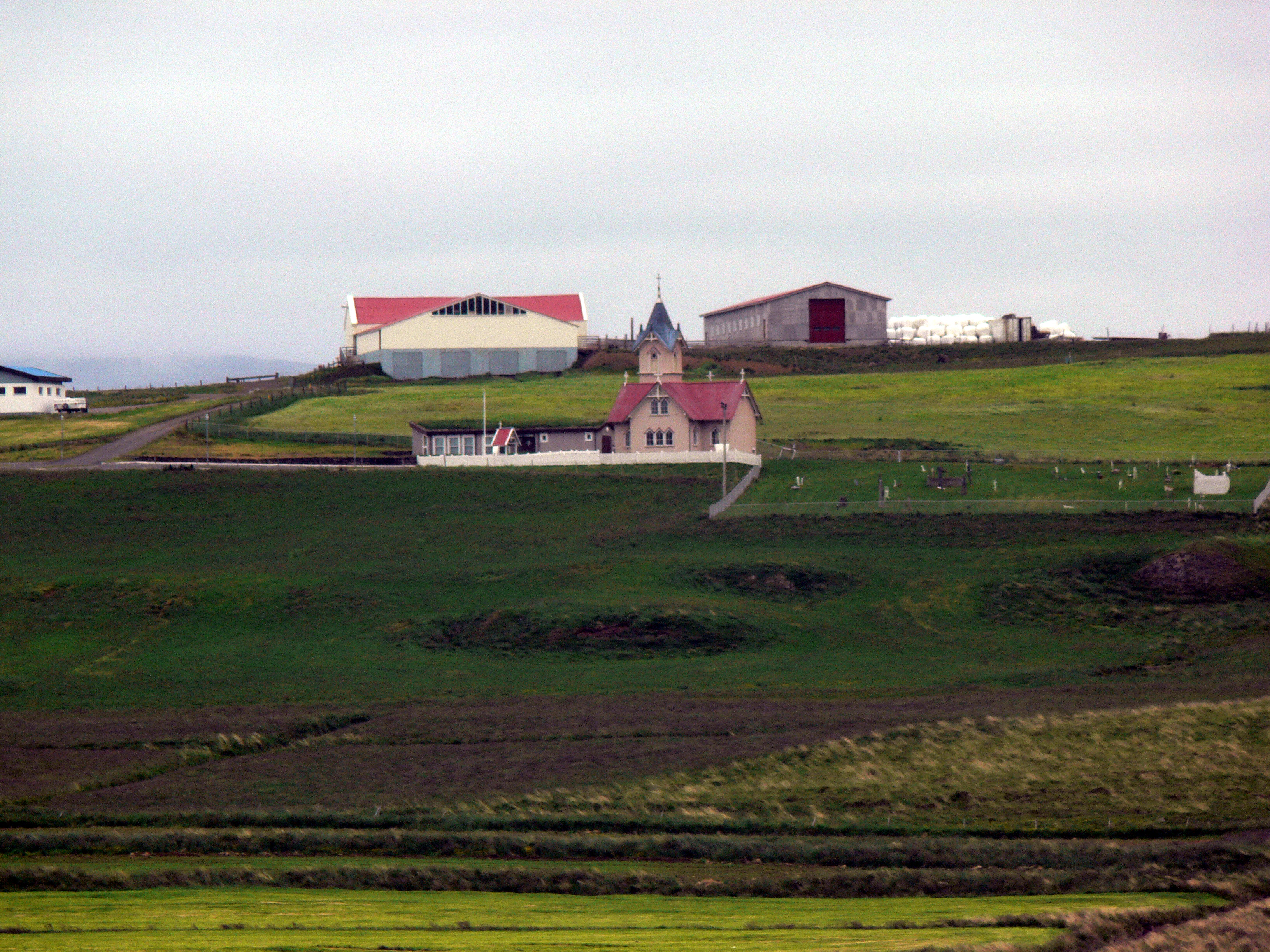 Hjarðarholt in Laxárdalur. Zentraler Schauplatz in der Laxdæla saga. Hier lebten Ólafur pá und sein Sohn Kjartan, der von seinem Ziehbruder in Svínadalur erschlagen wurde.